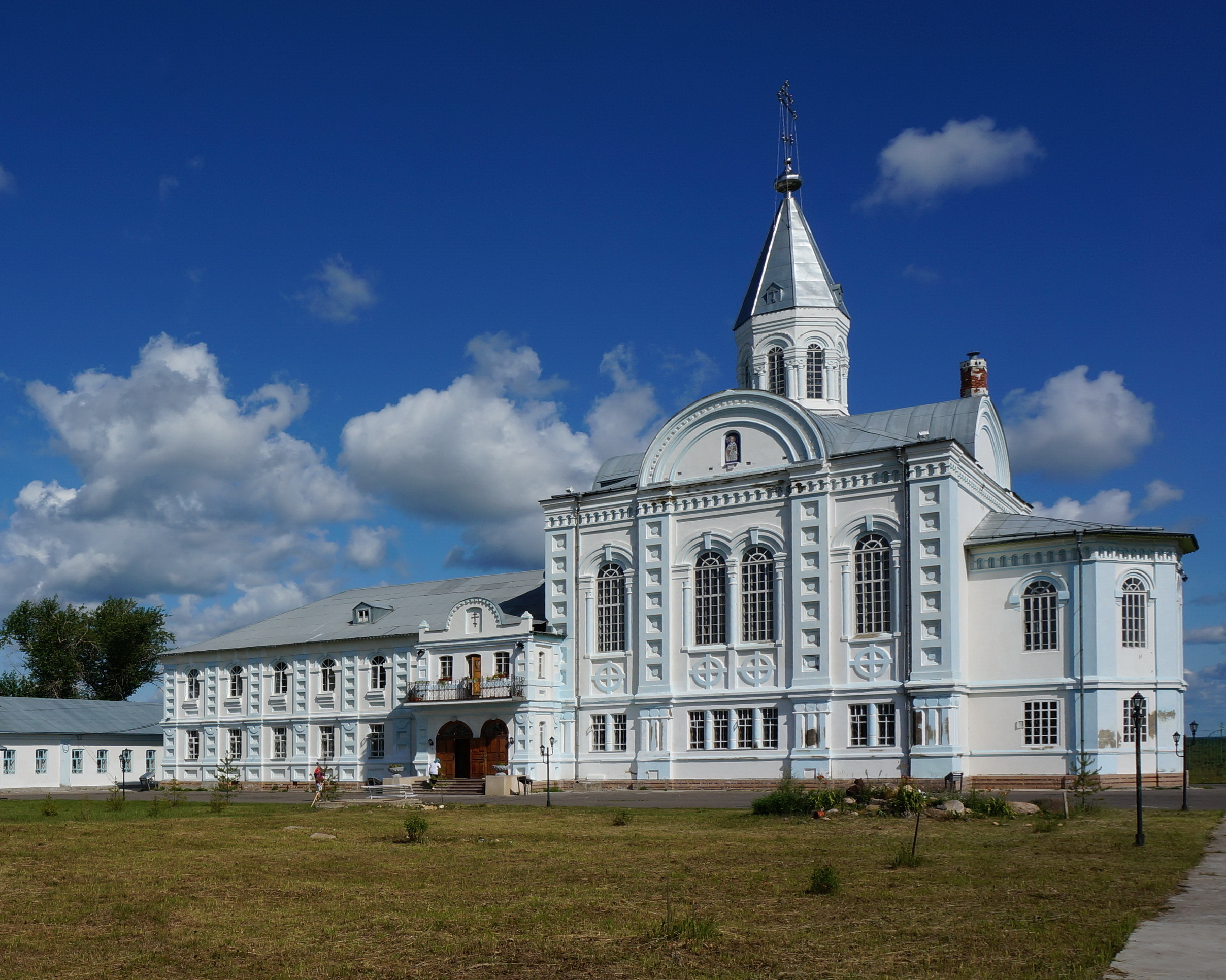 Николаевский собор (Архангельская область, Коряжма, кедрова улица)